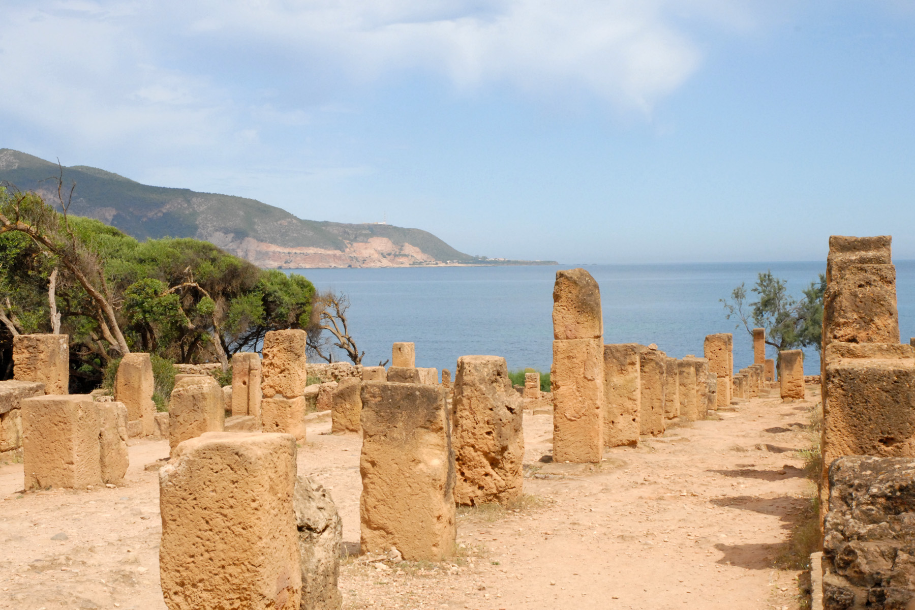 Le Cardo maximus, un des deux axes de la ville romaine, se prolonge vers la mer. Les Phéniciens ont fondé à Tipaza un comptoir vers le Ve siècle av. J.-C. : c'est de cette origine que la ville tire son nom qui signifie « lieu de passage » ou « escale ». La ville connaît son essor sous le roi numide Juba II et devient avec Caesaria (actuelle Cherchell) l'un des foyers de la culture gréco-romaine en Afrique du Nord. Tipaza avait alors le type de la ville punique car elle se situait dans l'aire d'influence de Carthage. Sous l'empereur romain Claude Ier, en 39, Tipaza prend le statut de municipe latin et se dote d'une muraille longue de plus de deux kilomètres. Hadrien éleva par la suite Tipaza au rang de colonie honoraire. À la fin du IIe siècle, la ville connaît son apogée avec une population qui s'élève, selon les estimations de Stéphane Gsell, à 20 000 habitants. Au deuxième siècle, cette cité romanisée s’agrandit vers l’ouest aux dépens d’une ancienne nécropole punique. Bien qu’elle était entourée d’une longue muraille de 2 km cela n’a pas empêché sa destruction en l’an 430 par les Vandales menés par Genséric (Wikipedia) Tipaza est un site inscrit au Patrimoine mondial de l'UNESCO en 1982. Les premières fouilles y ont été effectuées en 1895.